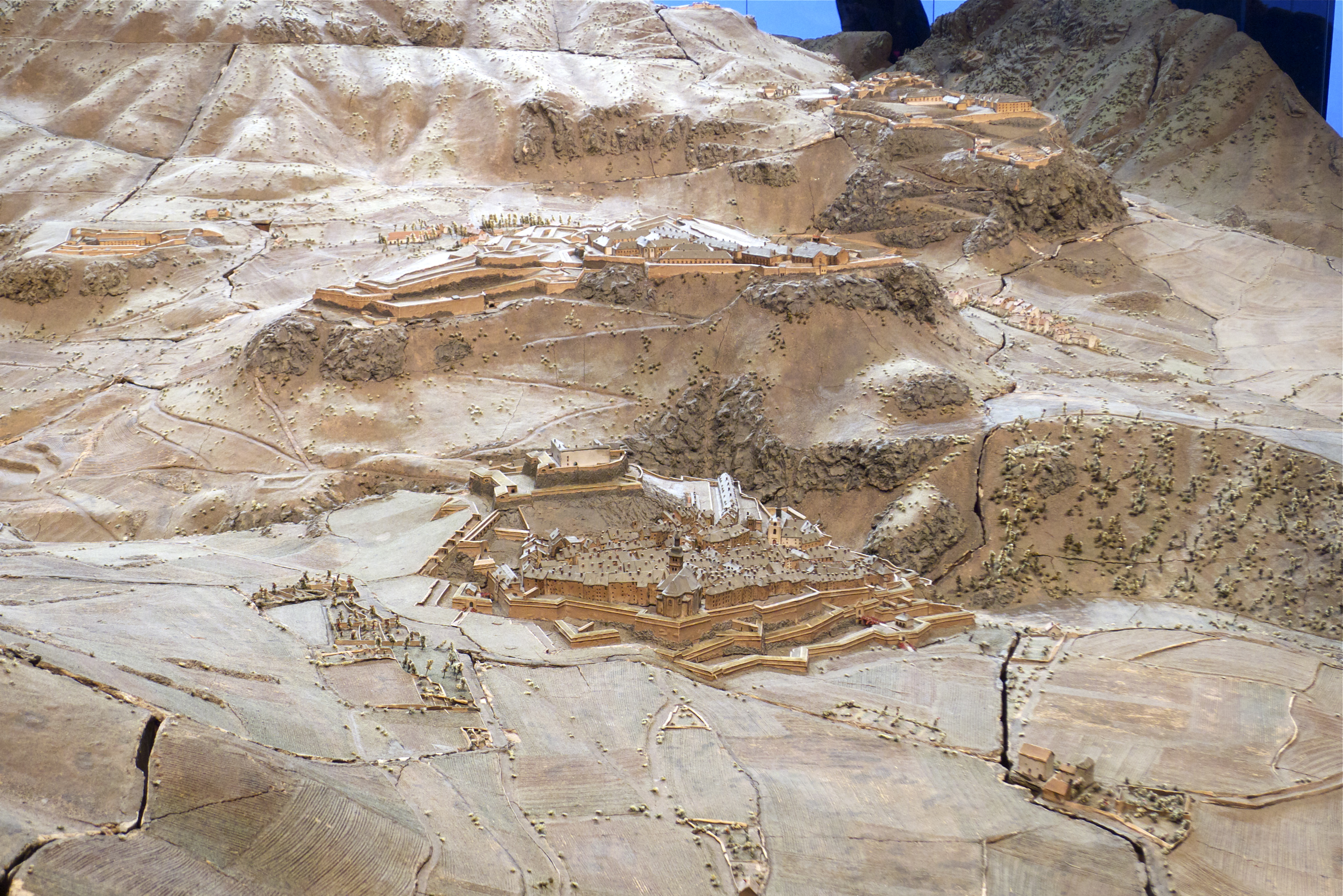 Plan-relief de Briançon en 1736. Plan-relief construit de 1733 à 1736 sous la direction de Colliquet et Nicolas de Nézot (1699-1768). Échelle 1/600e